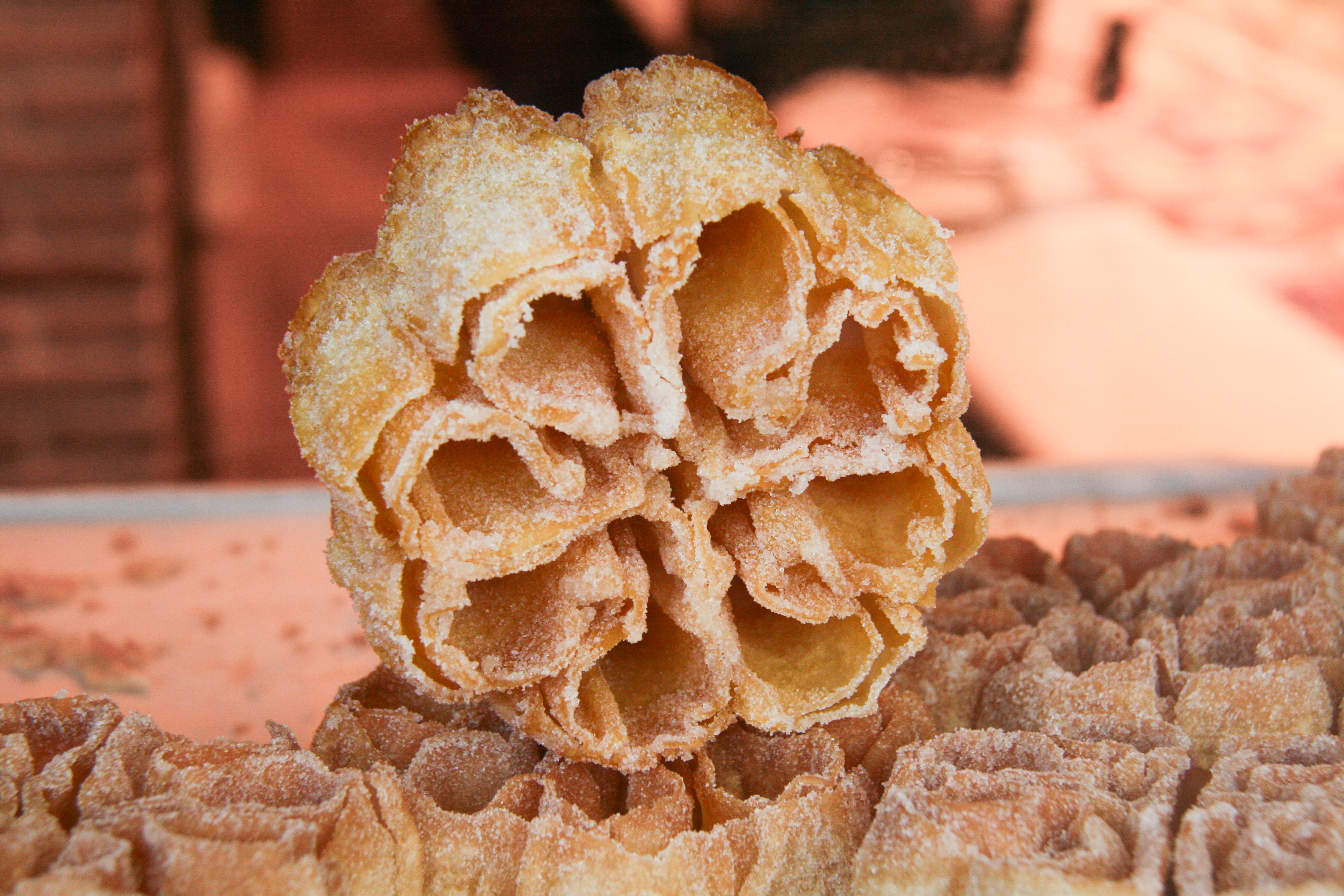 Flores fritas, o manchegas